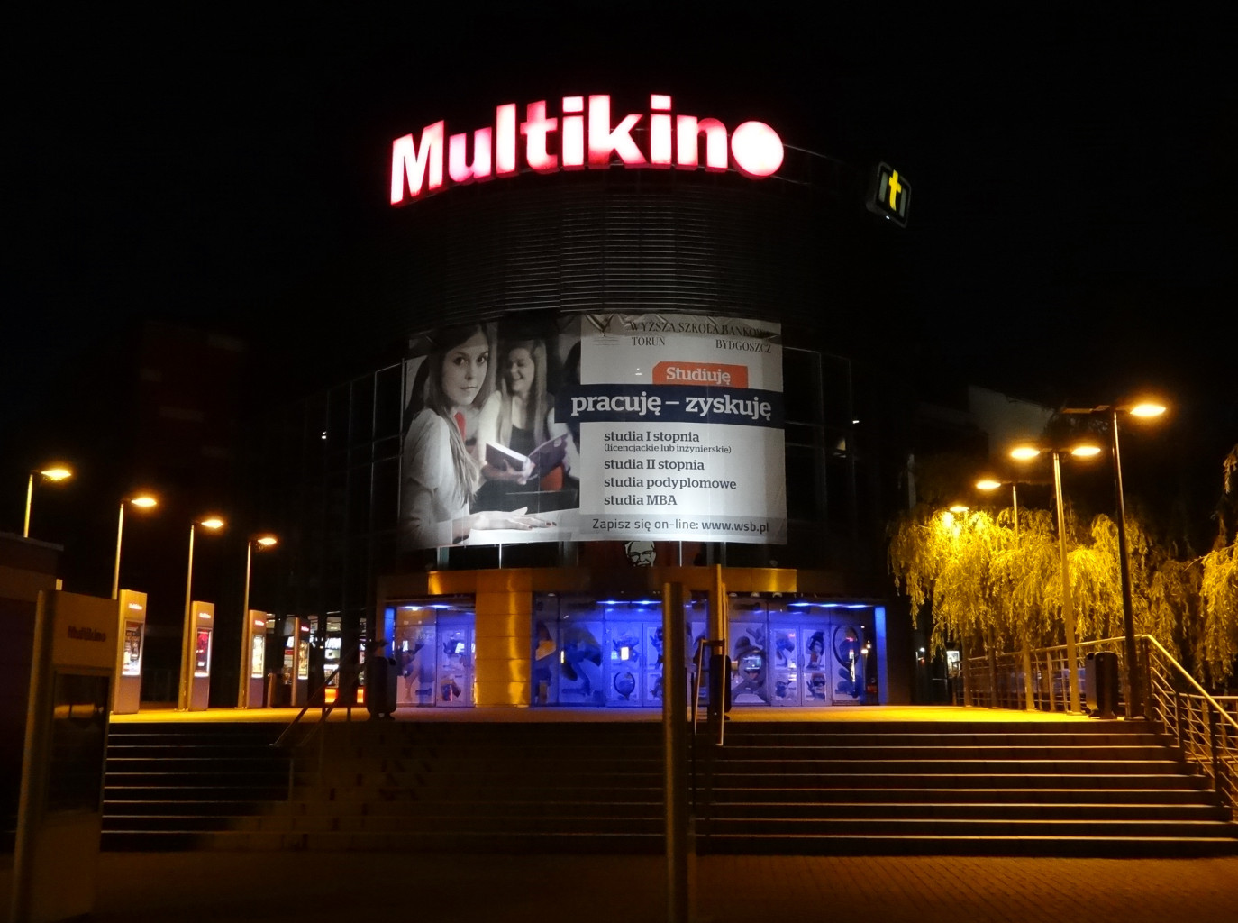 Multikino (10 sal, 2175 miejsc) w Bydgoszczy przy ul. Focha, zbud. w 2001 roku